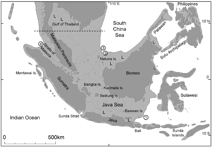 מפת סונדאלנד בשיא תקופת עידן הקרח האחרון. השטחים באפור בהיר מציינים את האזורים שנחשפו והשטחים באפור כהה מתארים את המפה בימינו. אגמים פוטנציאליים מסומנים באות L, והספרות מתייחסות לנהרות שהיו.